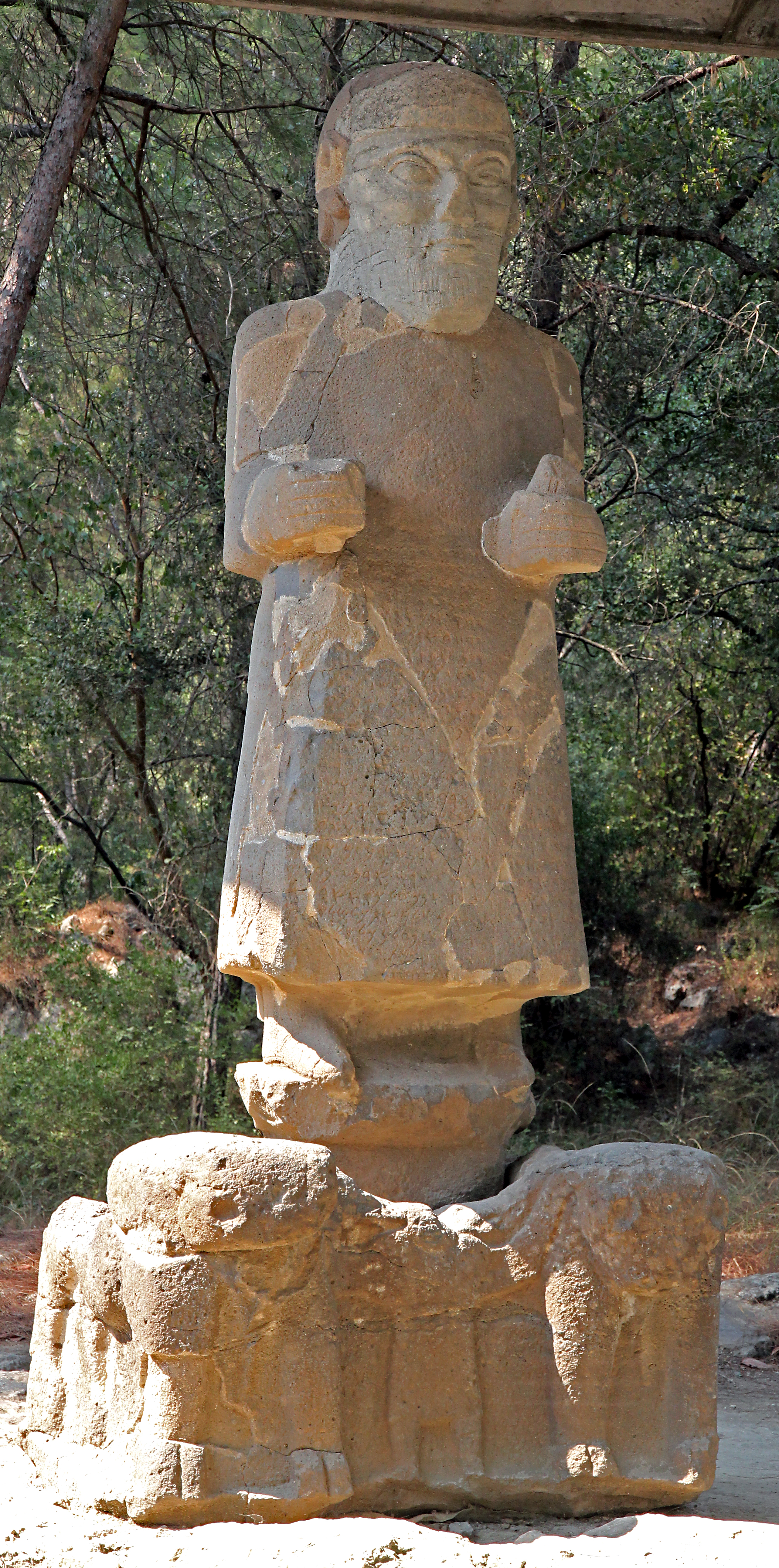 Karatepe (Asatiwataya), neo-hethitischer Fundort bei Osmaniye, Südtürkei, Skulptur des hethitischen Wettergottes Tarhunzas am Südtor